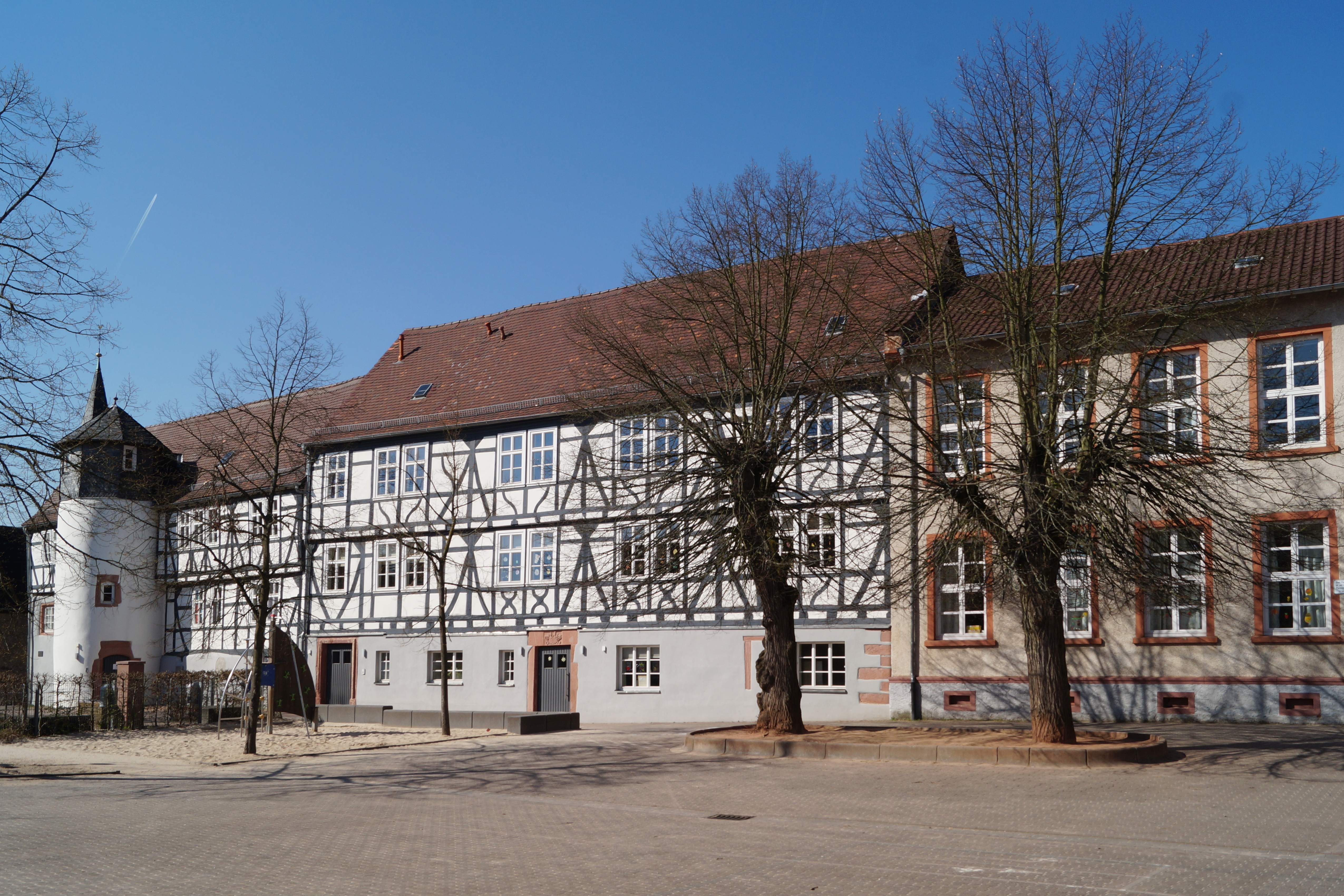 Sogenanntes Schloesschen in Rückingen, Stadt Erlensee in Hessen. Wohngebäude als Rest des ehemaligen Herrenhofs, Ansicht von der ehemaligen Hofseite.